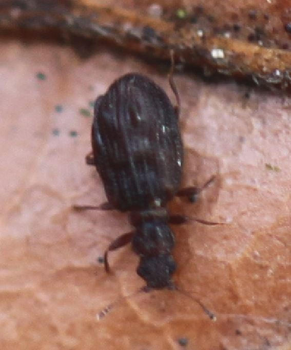 Cartodere nodifer am 12. Februar 2019 an Totholz südlich von Heidelberg